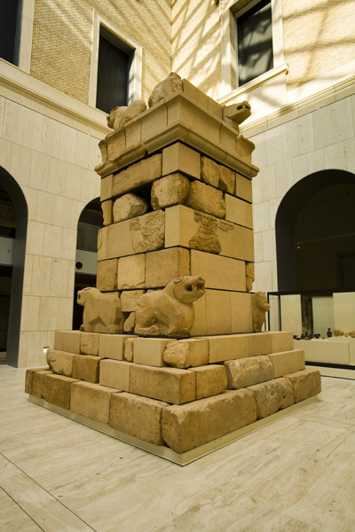 Monumento de Pozo Moro (Cultura ibérica). Número de inventario: 1999-76-A.